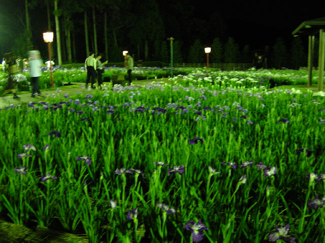 Kamo Shōbuen (賀茂しょうぶ園) in Toyohashi, Aichi, Japan.